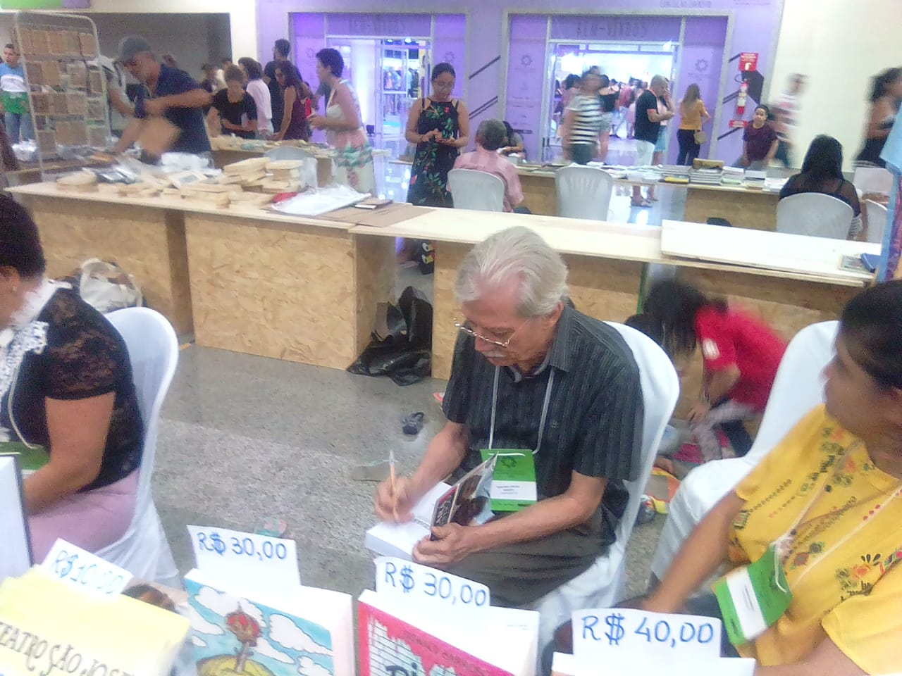 Oswald Barroso na Bienal do Livro do Ceará